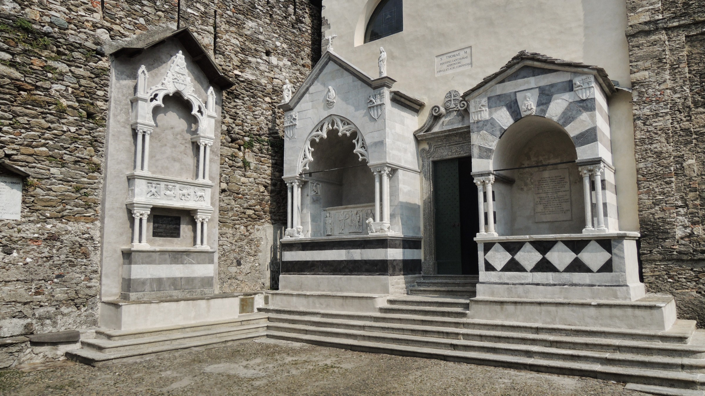 Corenno Plinio. Arche Andreani del XIV sec.